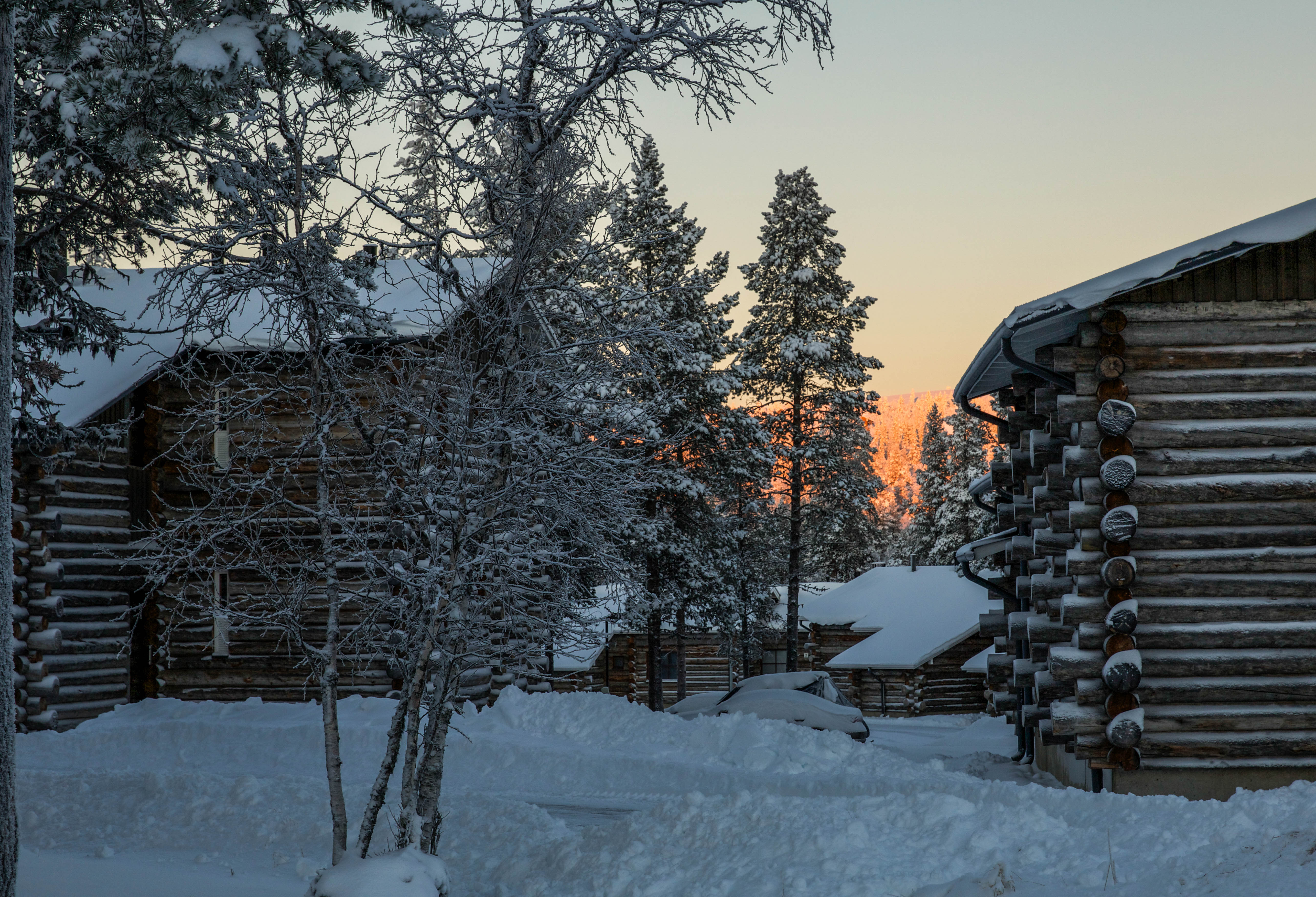 Saariselkä, Lapland